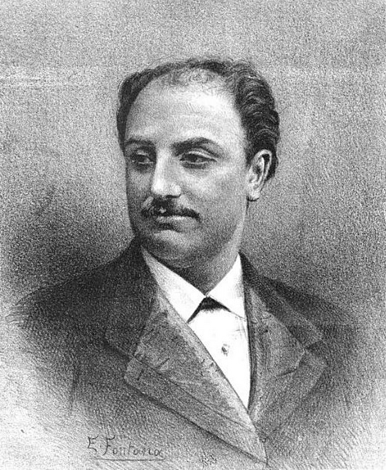 Итальянский оперный певец Антонио Котоньи